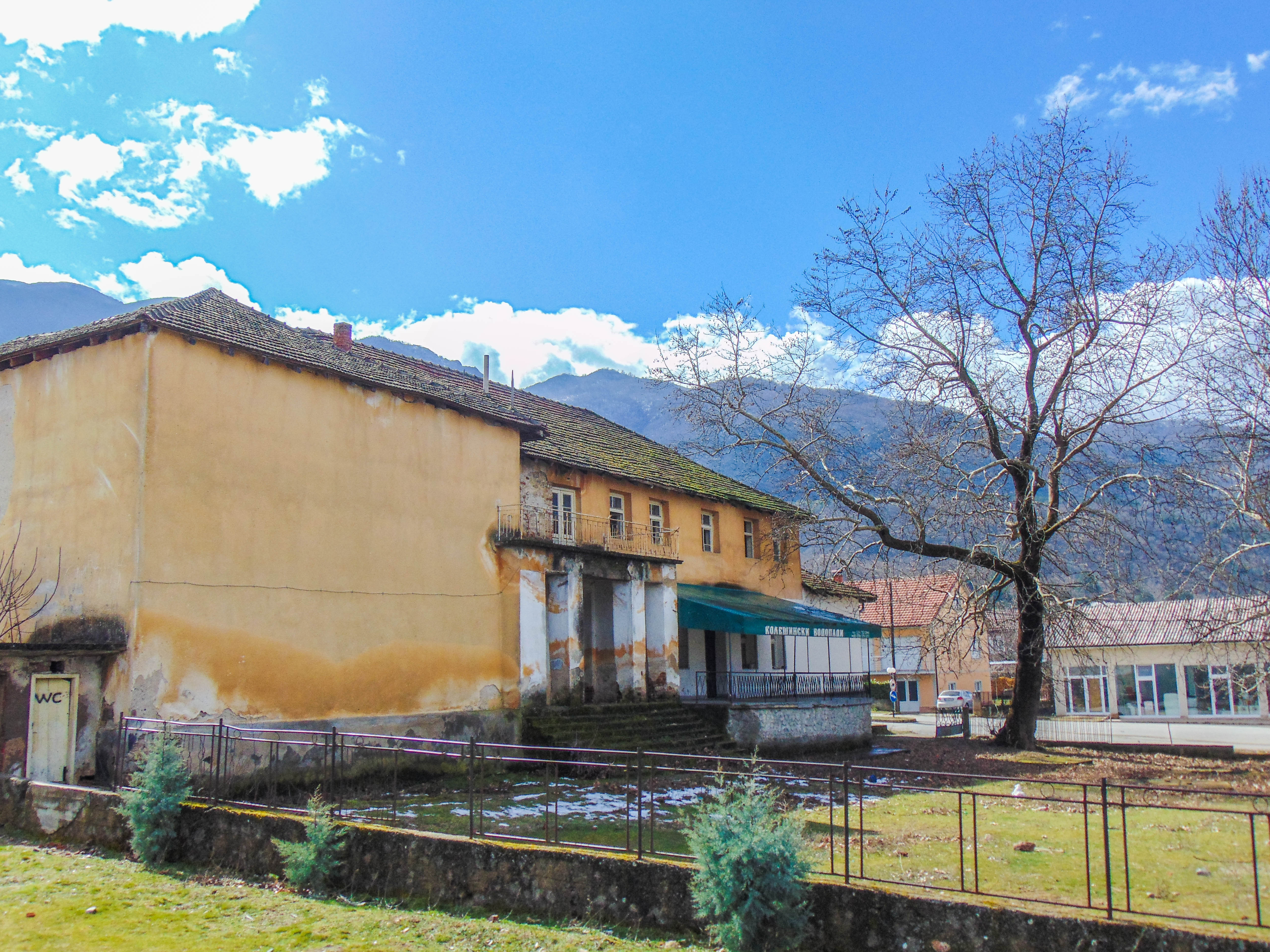 Дом на културата